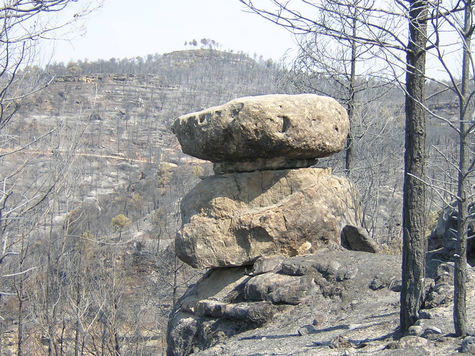 El Codro del Serrat del Trompa (Monistrol de Calders, Moianès)